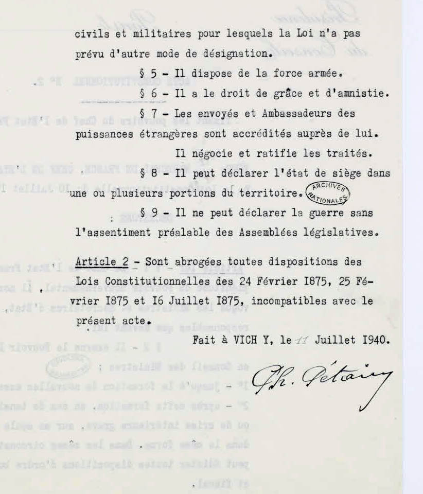 Acte constitutionnel numéro 2 fixant les pouvoirs du chef de l'État français, signé par Pétain, 11 juillet 1940